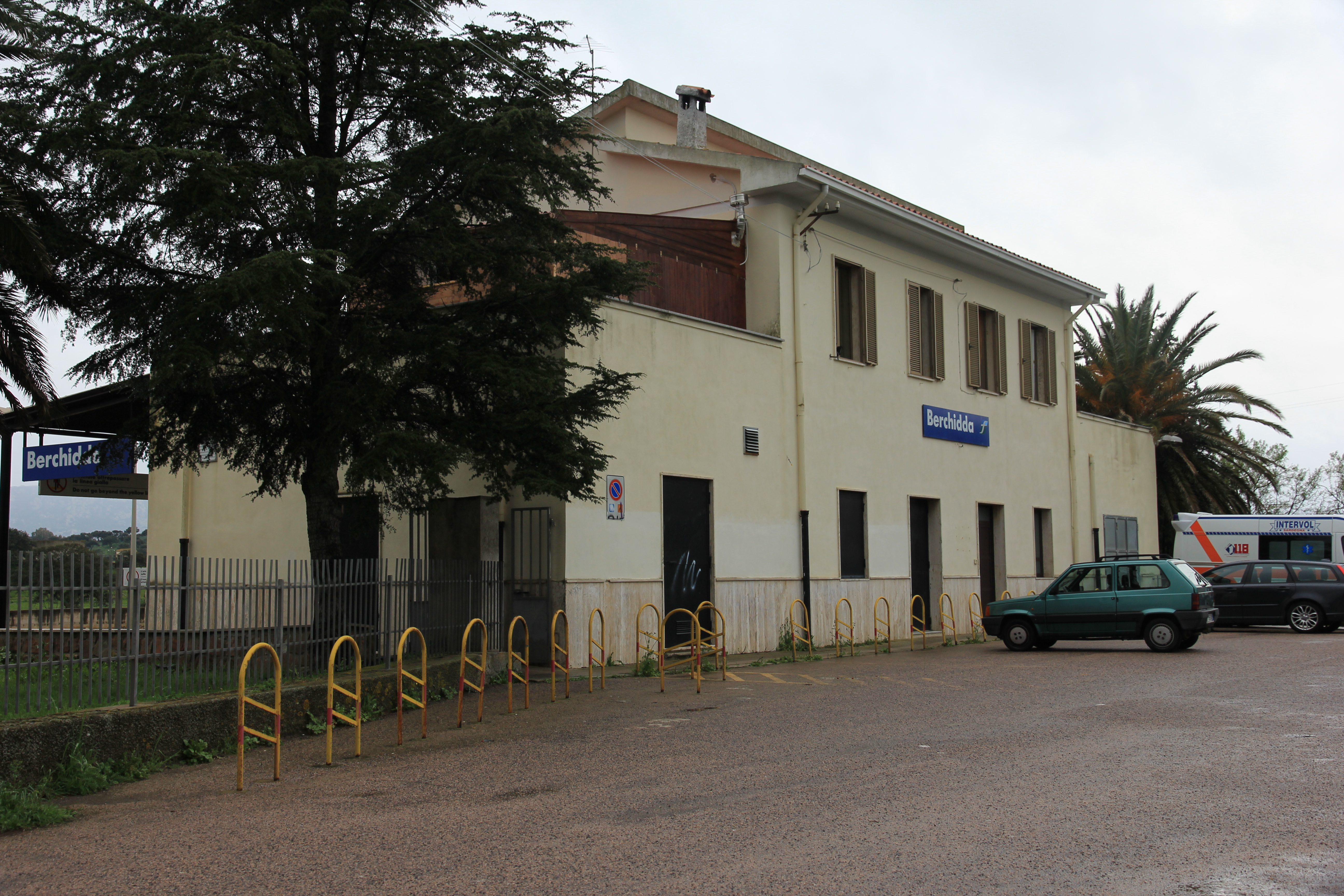 Berchidda - Stazione ferroviaria